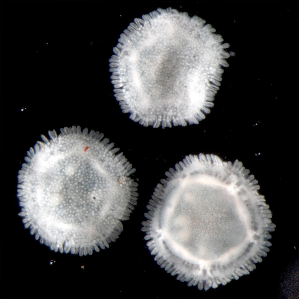 Photo scientifique de l'étoile de mer Xyloplax janetae.